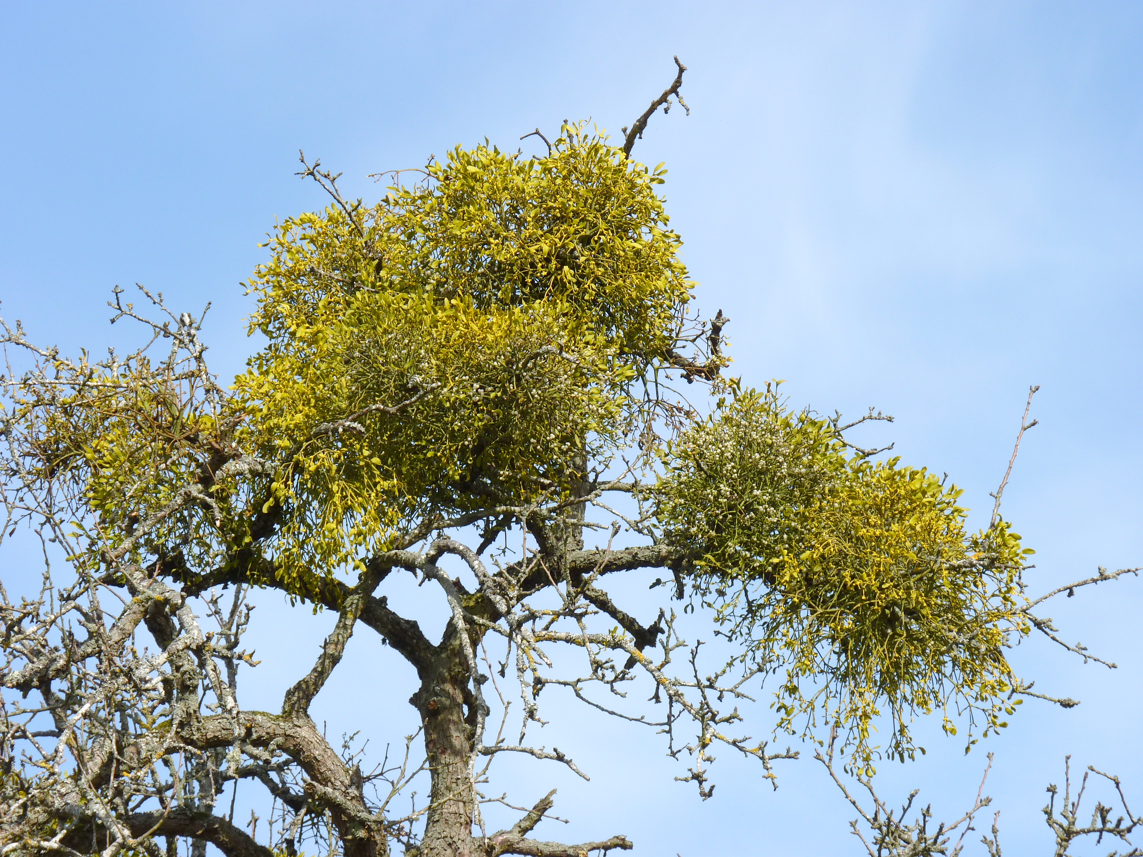 Gui, Montagny-lès-Seurre (Côte d'Or, Bourgogne, France)